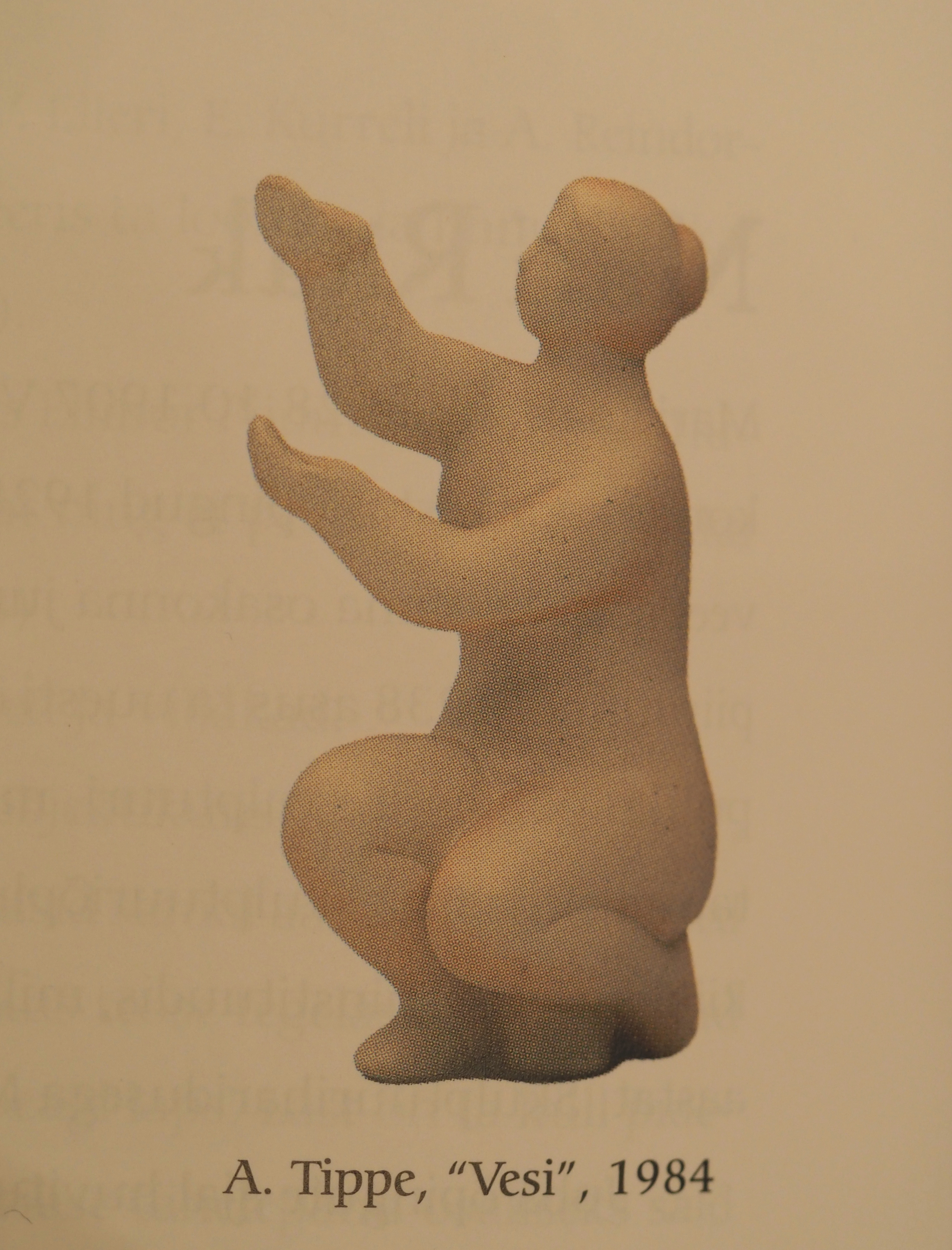 Pisiplastiline vorm